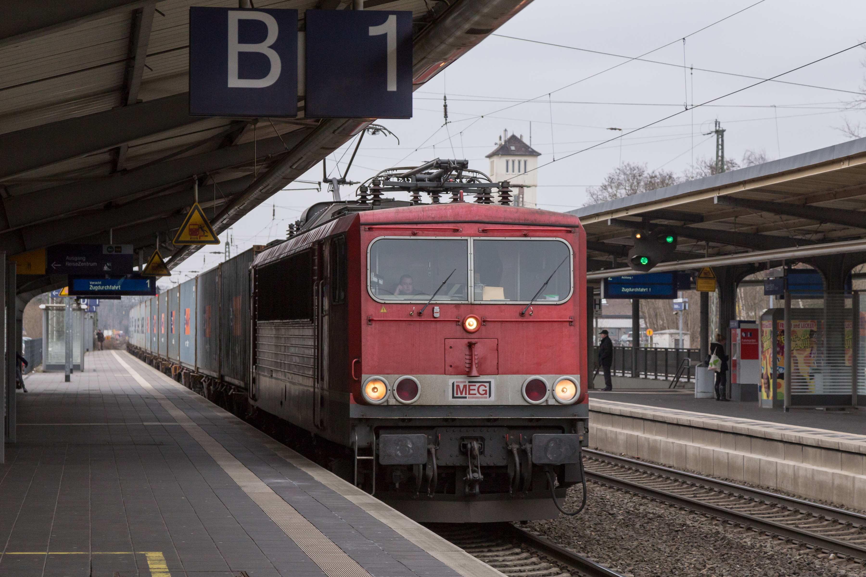 Containerzug der Mitteldeutschen Eisenbahn MEG durchfährt den Bahnhof Verden/Aller